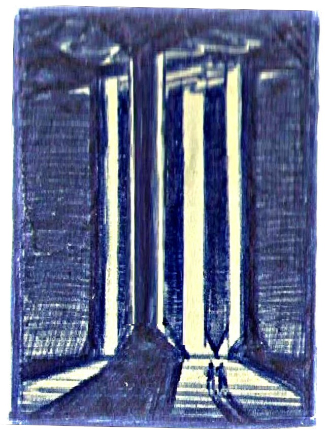 Bühnenbild für Parsifal (Arnaldo Dell'Ira 1903-1943)